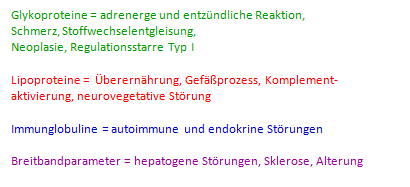 Proteingruppen und Diagnosengruppen